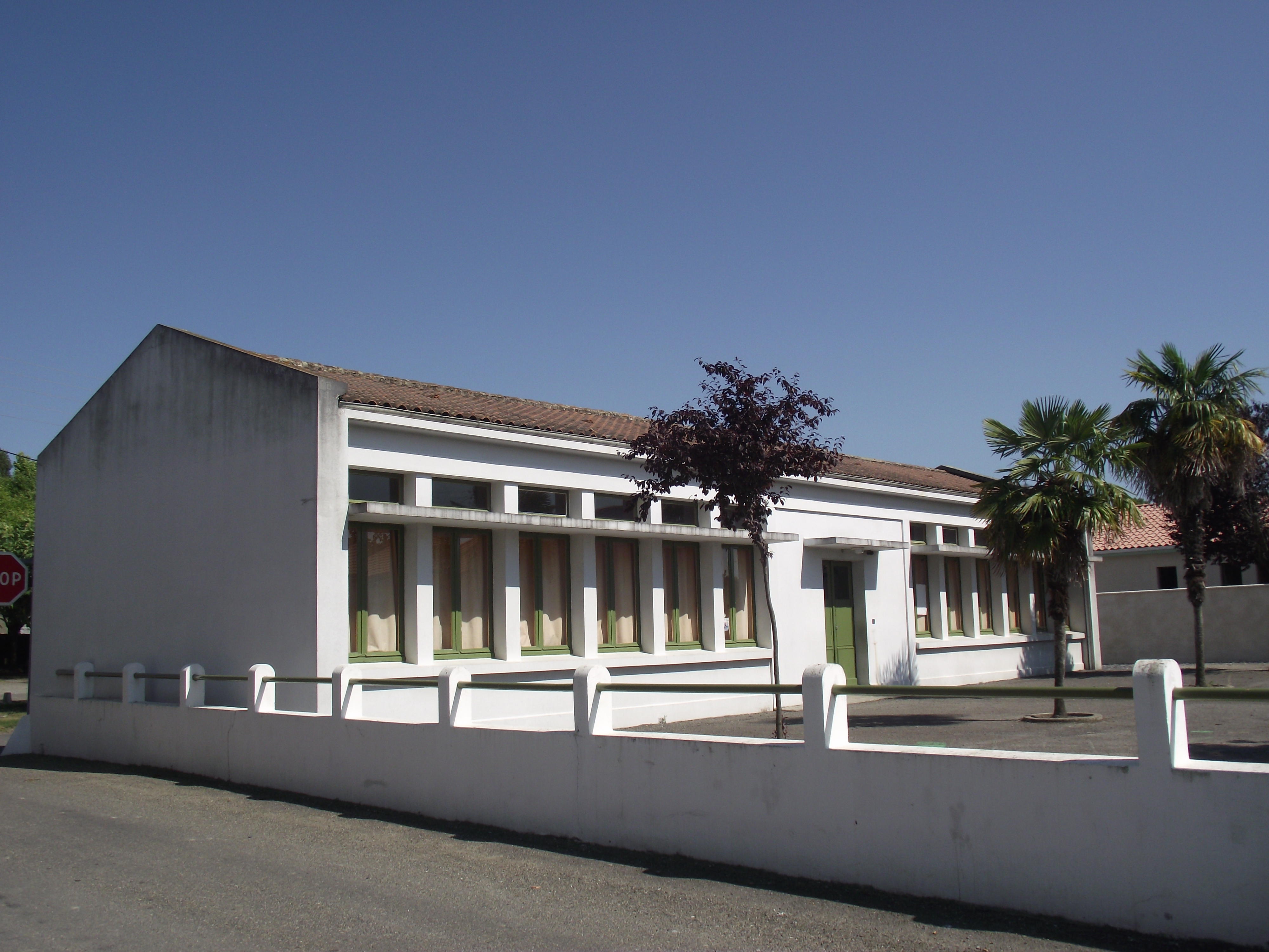 École de Sarriac-Bigorre